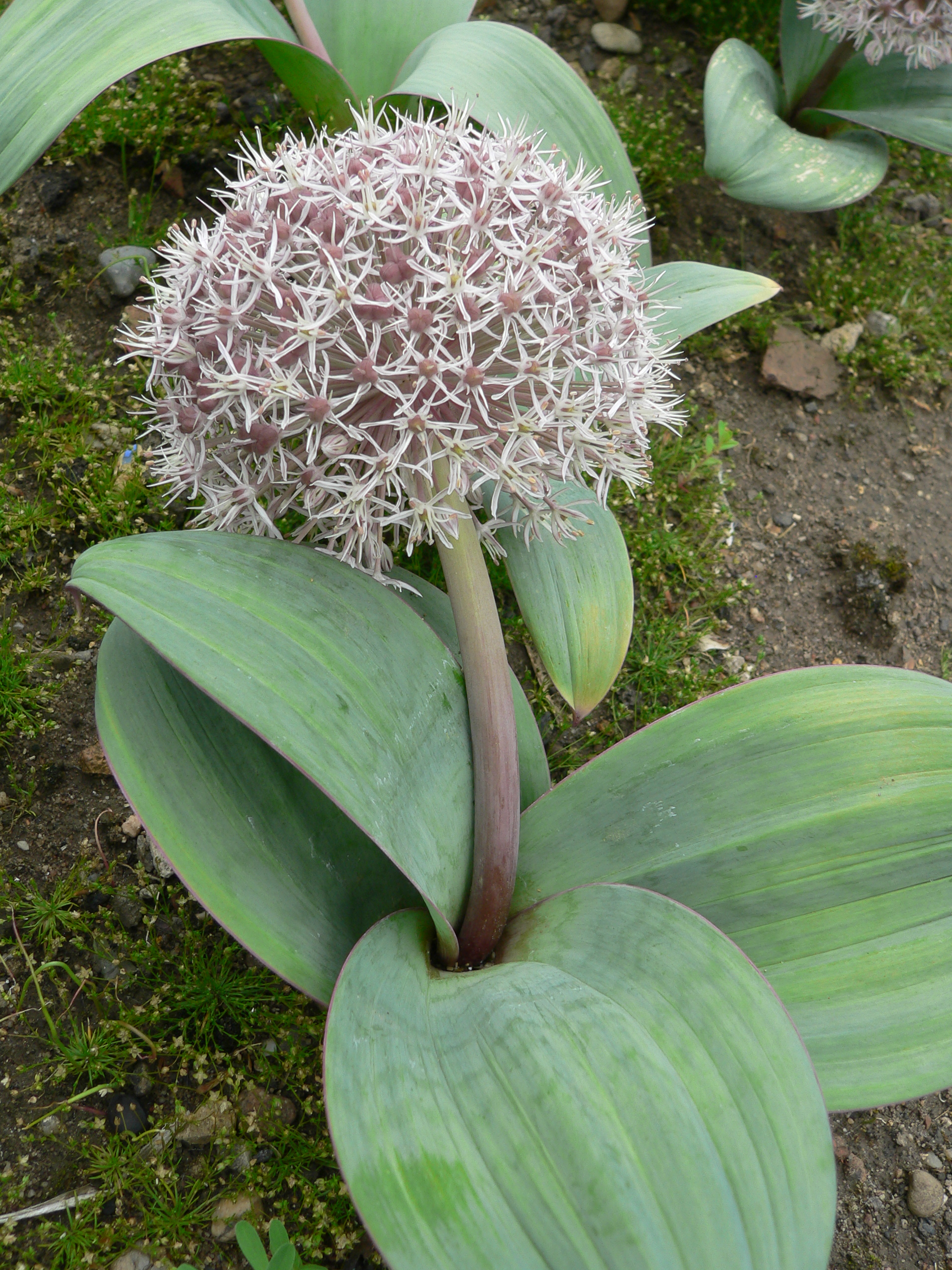 Allium karataviense